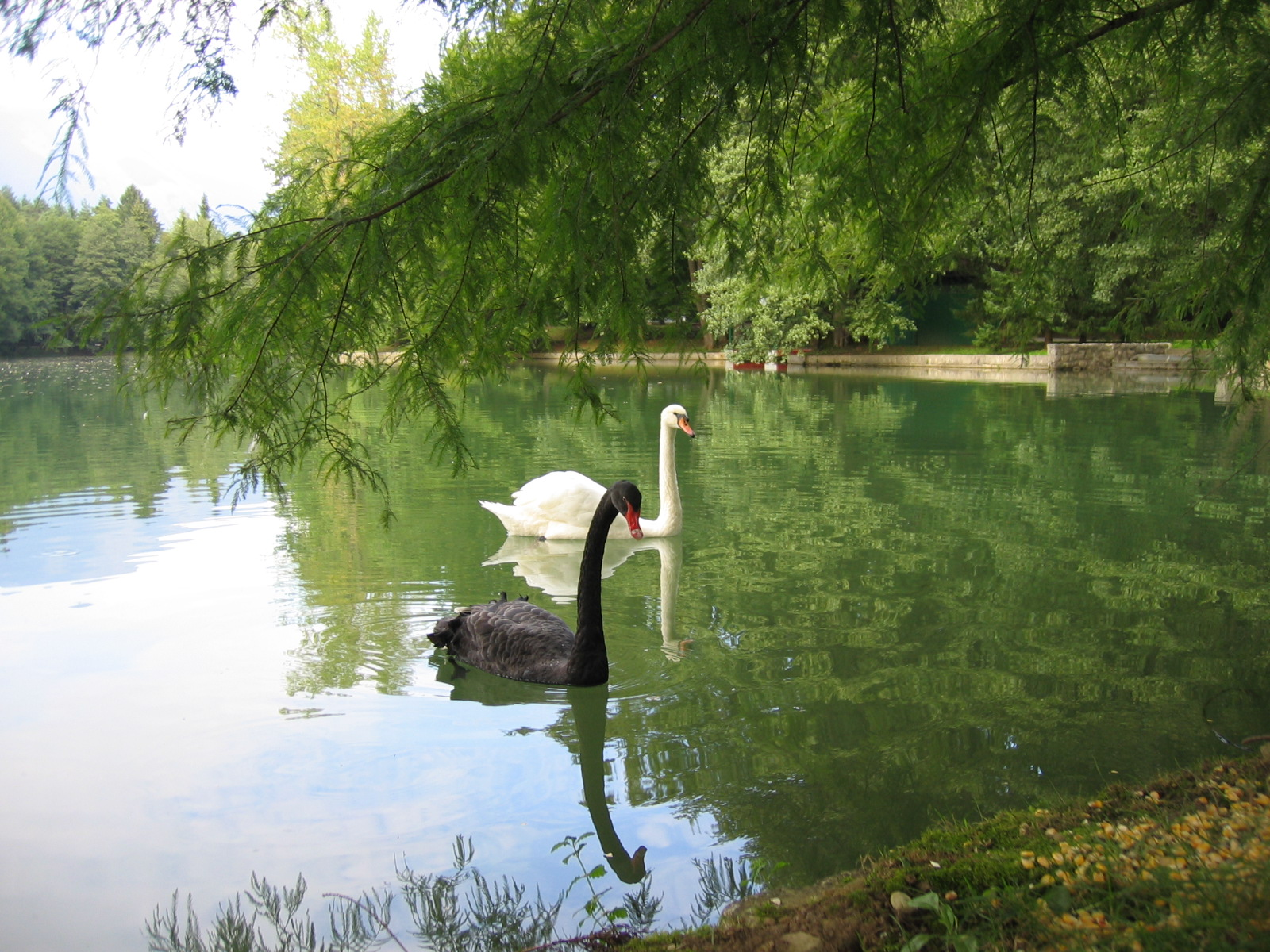 Laboda na ribniku znotraj posestva Brdo pri Kranju.